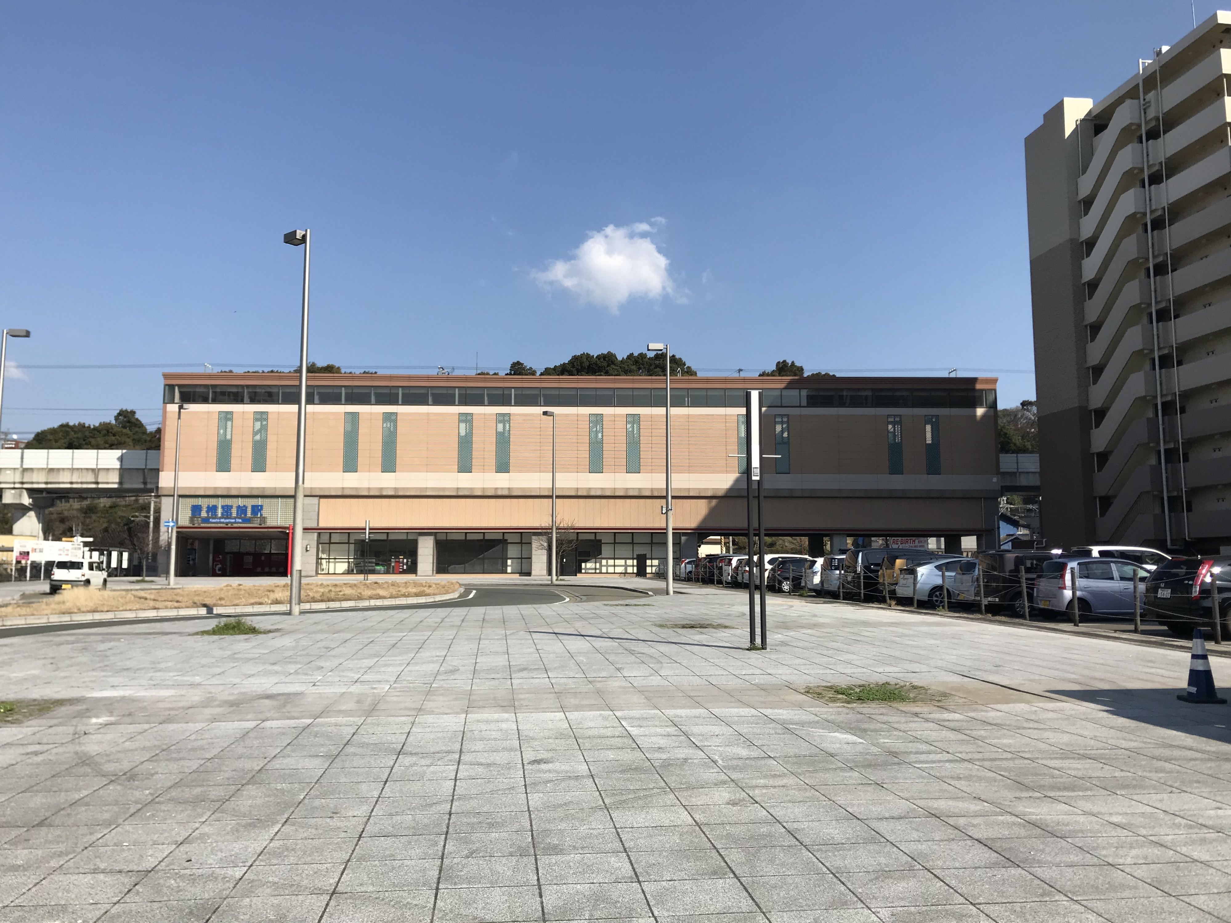 香椎宮前駅駅舎